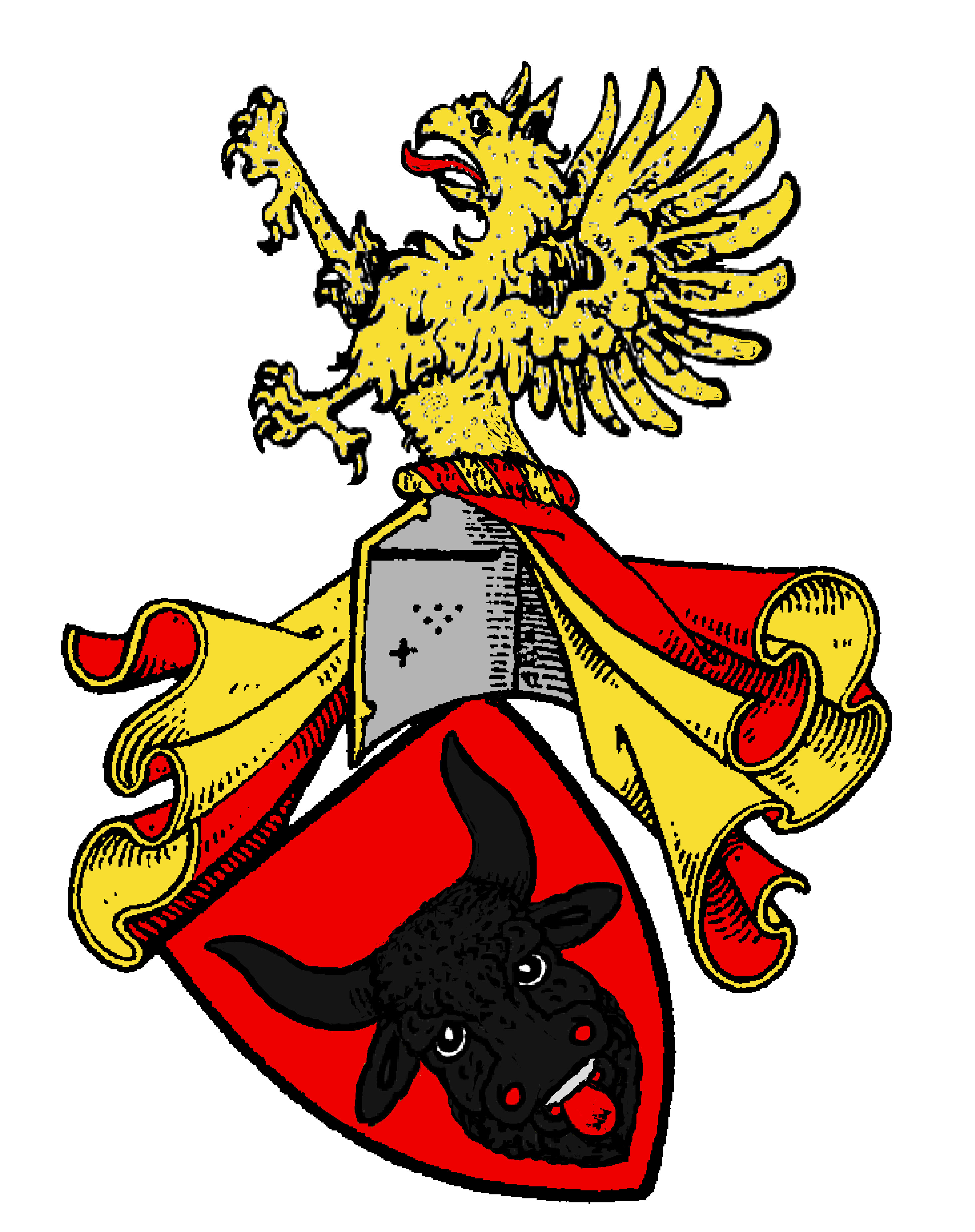 Stammwappen der preußischen, aus Süddeutschland ursprünglich stammenden (von) Auer